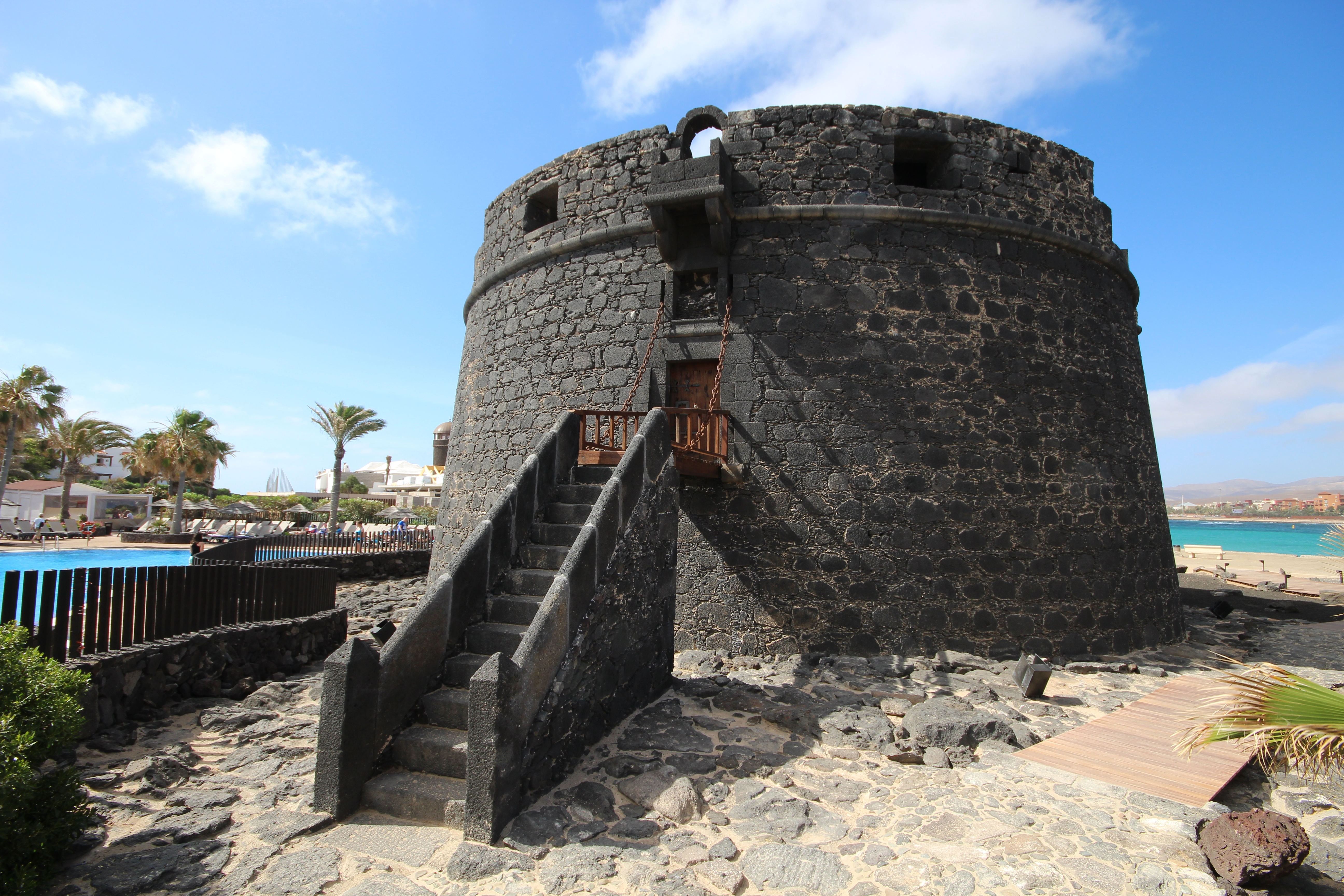 Caleta de Fuste, Antigua, Fuerteventura.